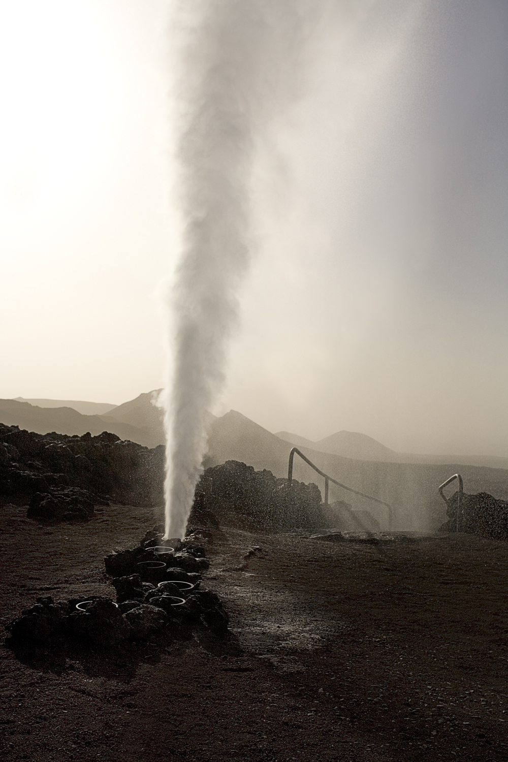 Timanfaya, Lanzarote